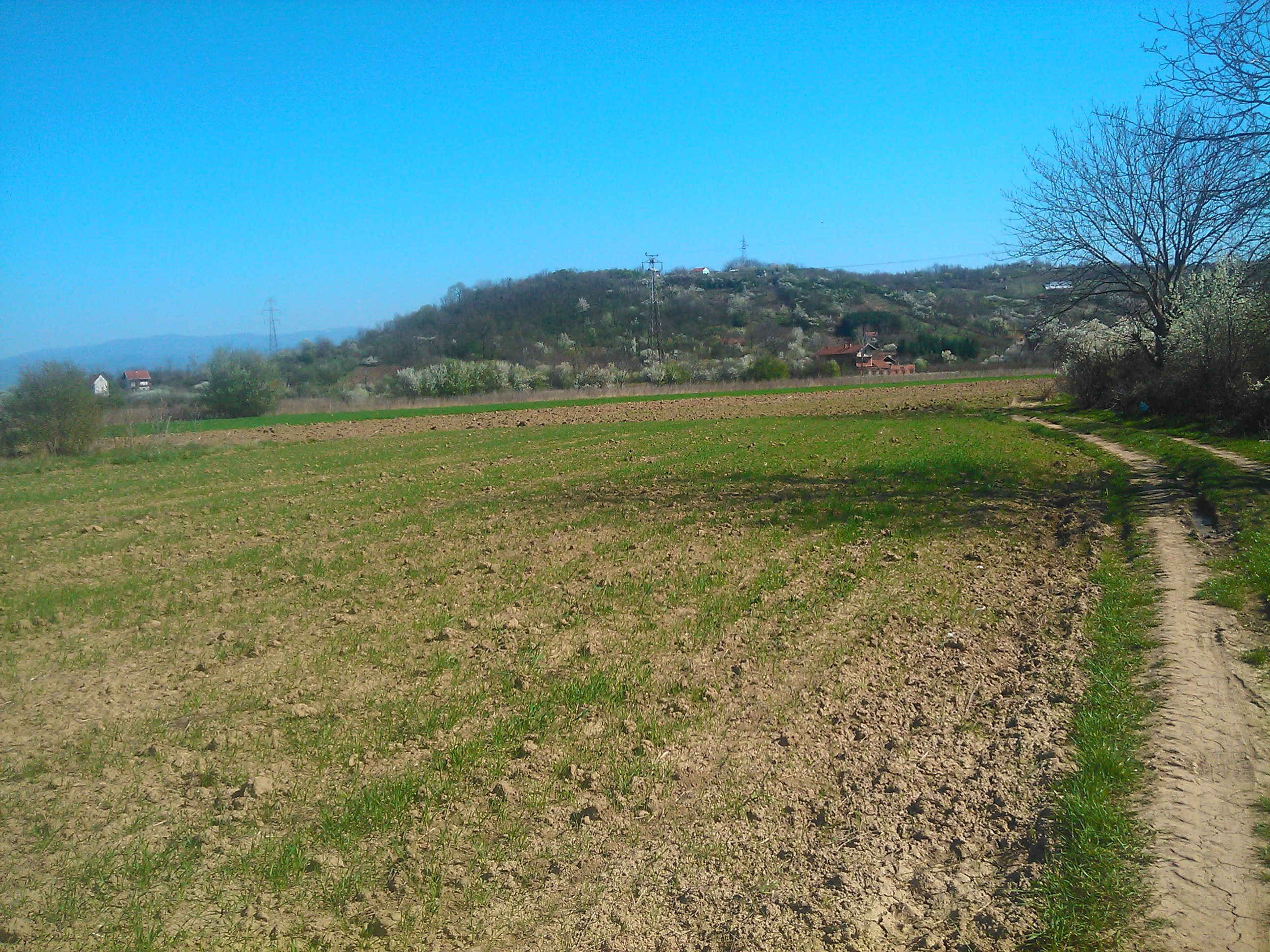 Srpski (latinica): Završna tačka Rudarske čuke